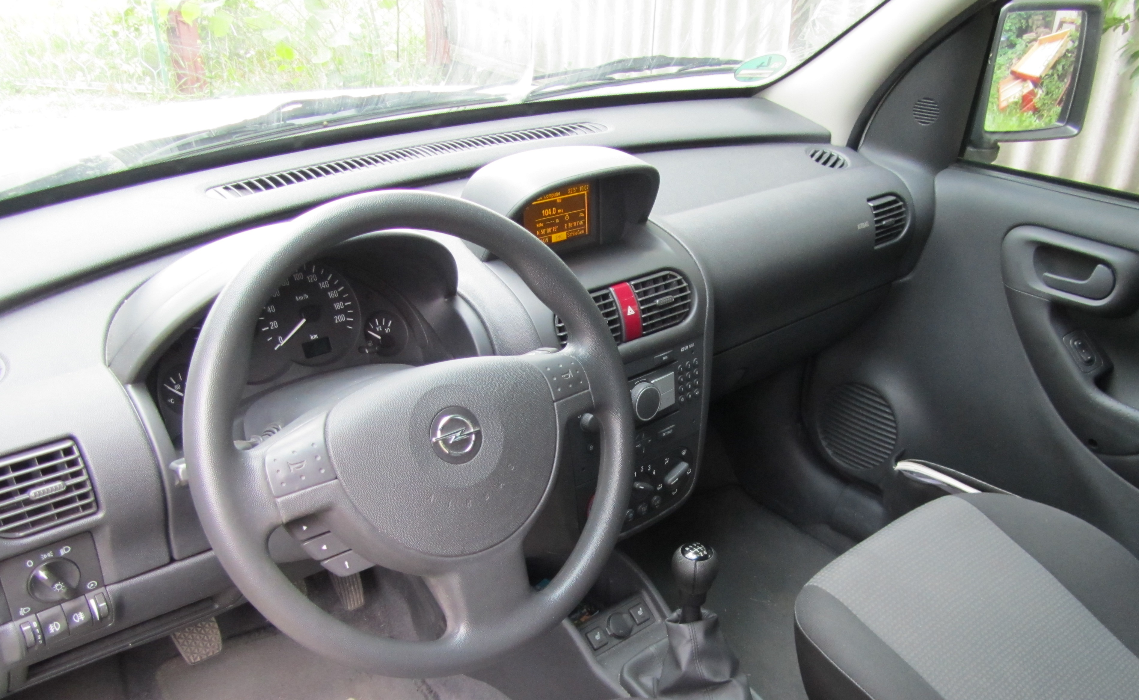 Передня частина салону вантажного Opel Combo C 1.3CDTI 2009 р.в. в багатій комплектації з кондиціонером, навігаційною системою, електропакетом, мультікермом, підігрівом сидінь, тощо.